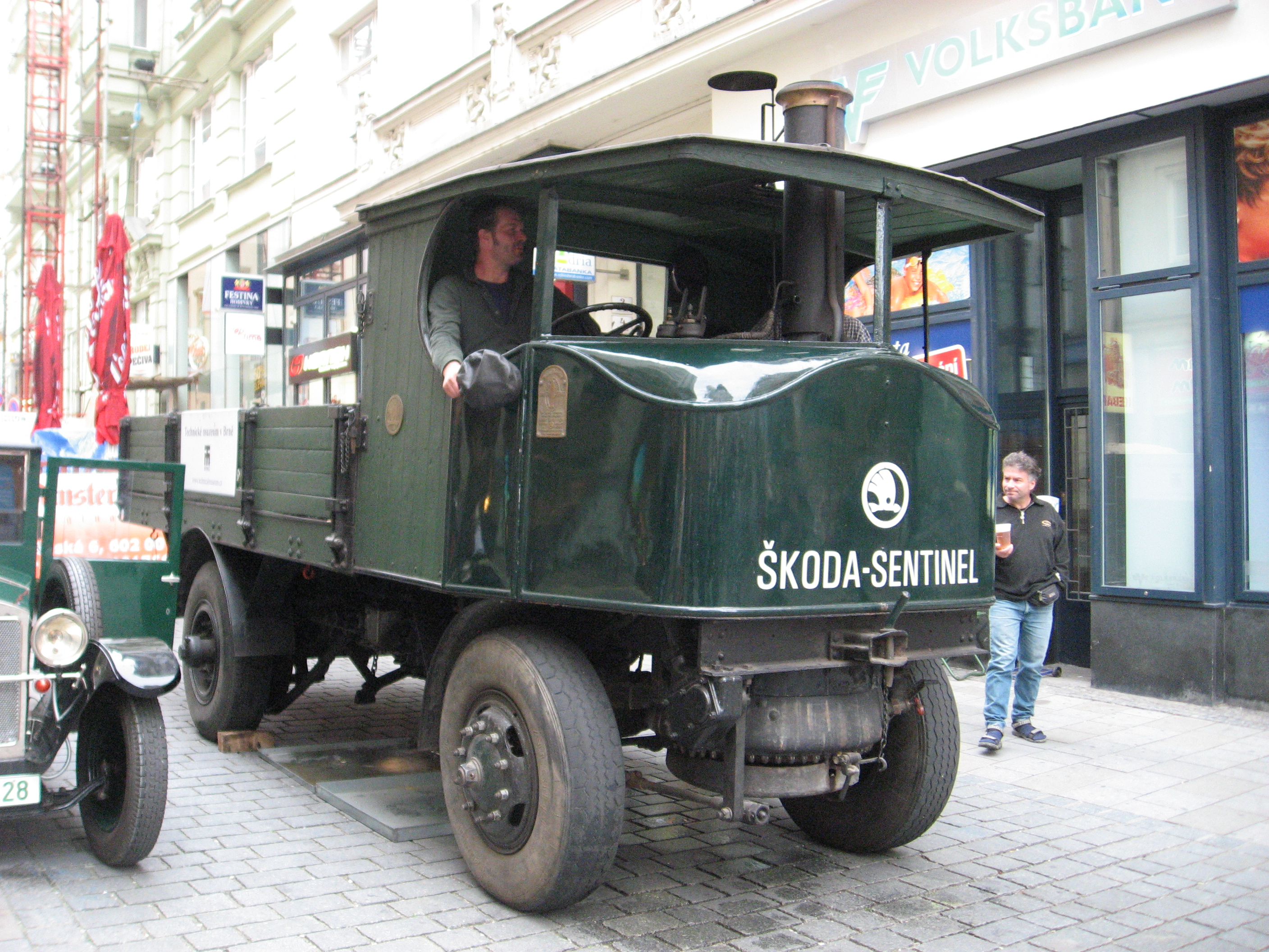 Brno, 140 let MHD